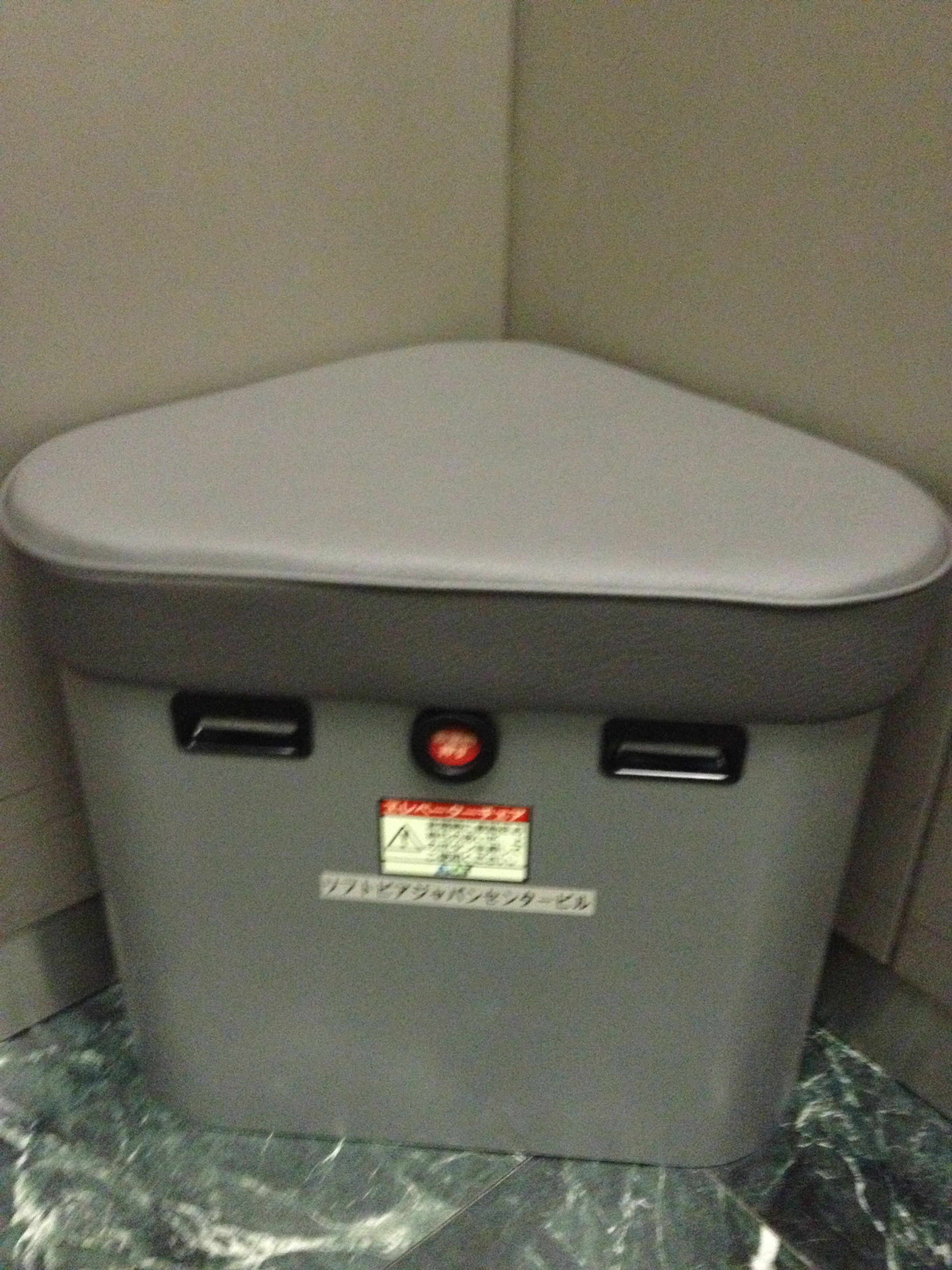 at ソフトピアジャパンセンタービル. Company "A&A.T CORPORATION" Official Site